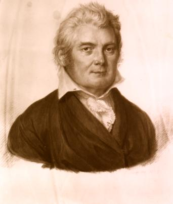 Johann Wilhelm von Krause (1757-1828)